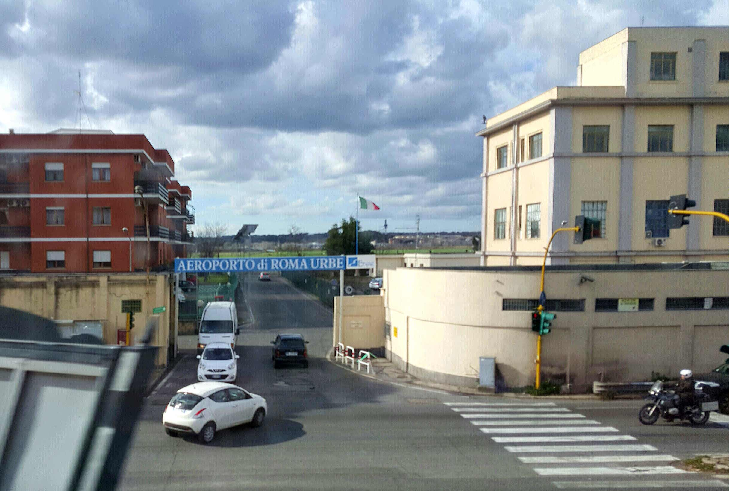 Aeroporto di Roma-Urbe, ingresso principale.